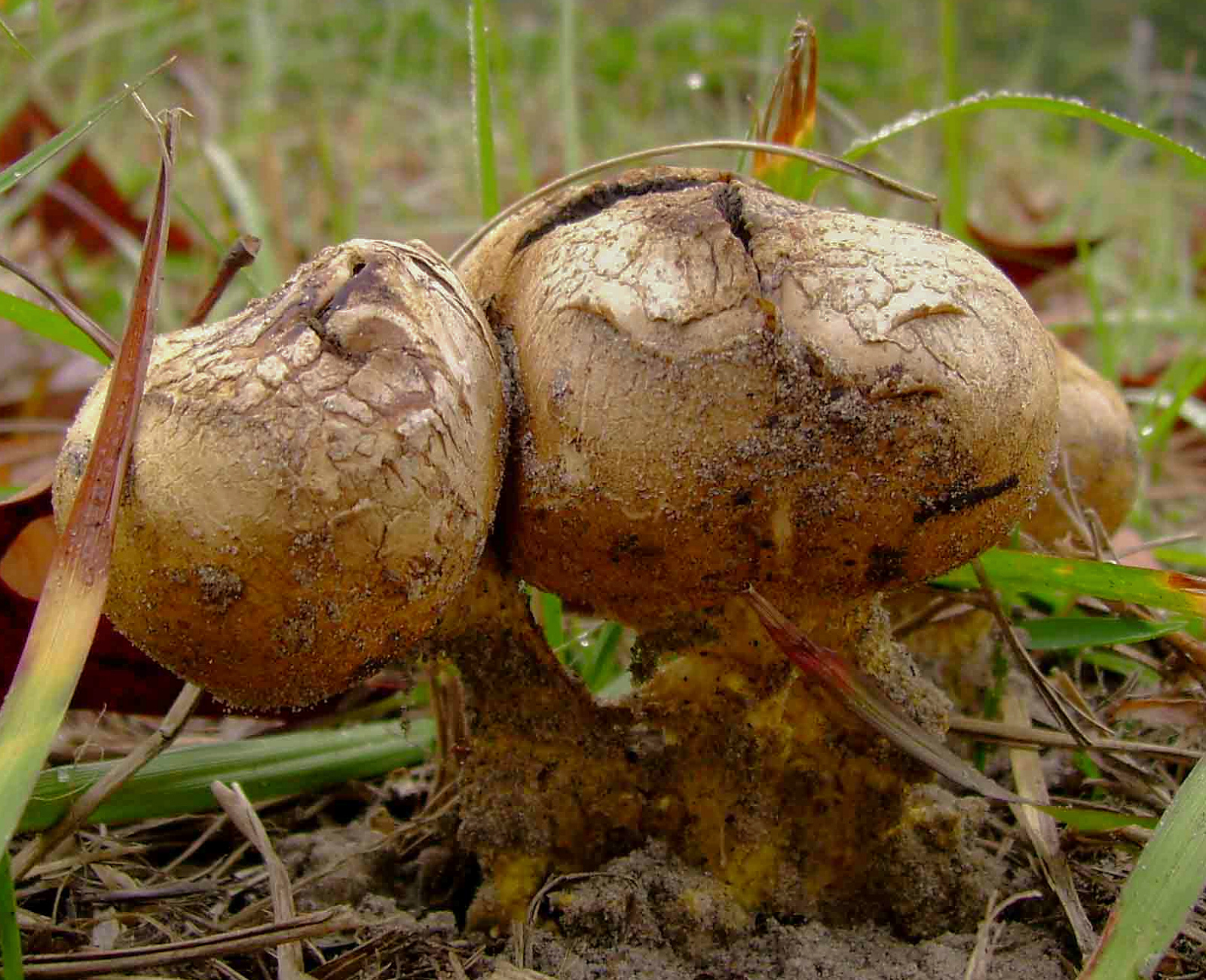 Scleroderma meridionale Demoulin & Malençon